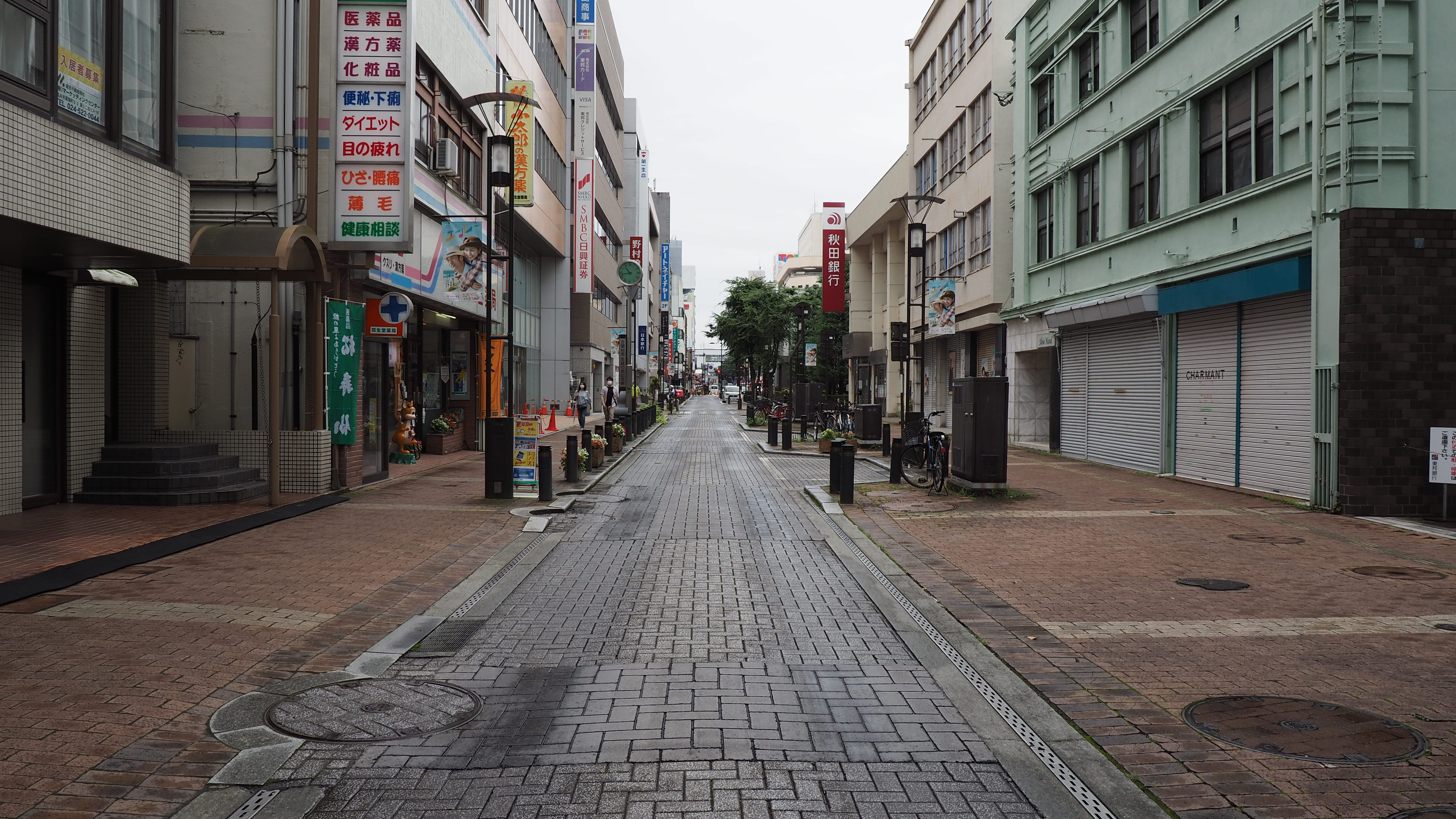 レンガ通りは奥州街道の一部である。東の端に福島市道路元標があり、西はパセオ470(旧すずらん通り)と交差する。2020年8月撮影。